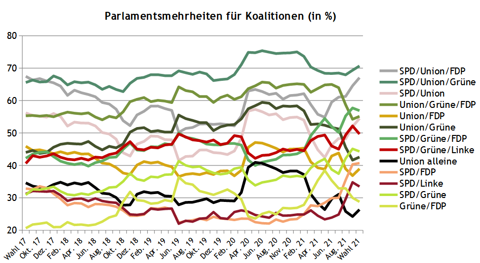 Parlamentsmehrheiten